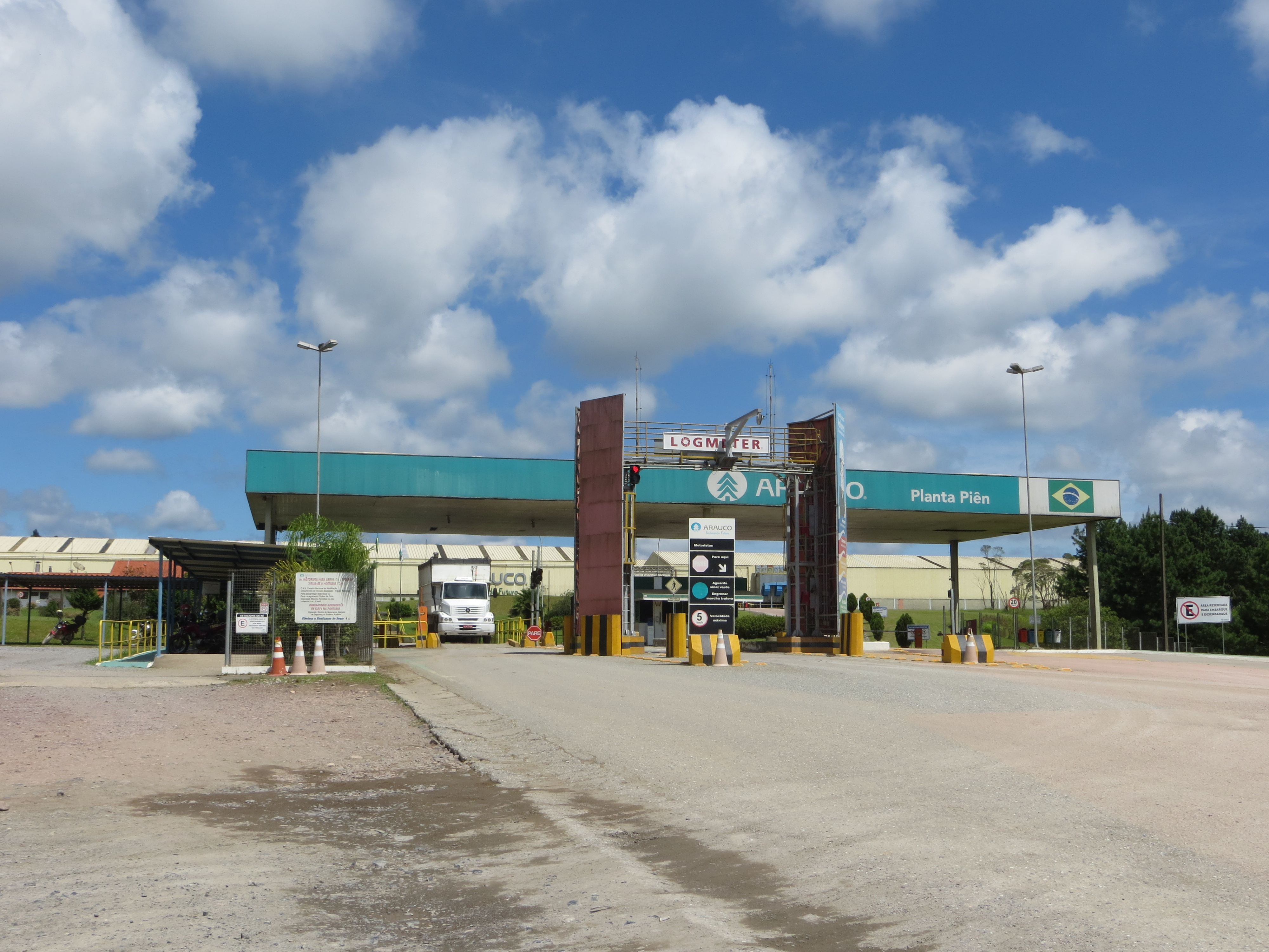 Indústria da Arauco do Brasil em Piên, Estado do Paraná, Região Sul do Brasil.